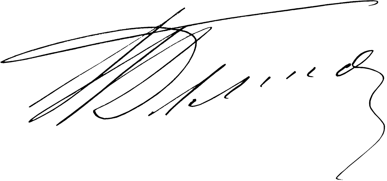 Подпись Киевского городского головы Павла Демидова князя Сан-Донато (1839–1885)